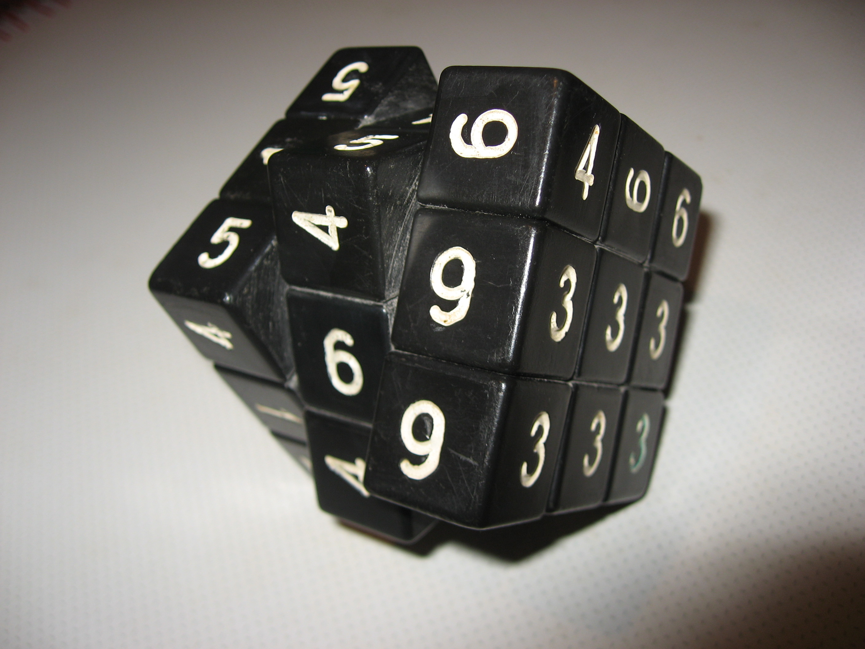 Цифровой вариант Кубика Рубика